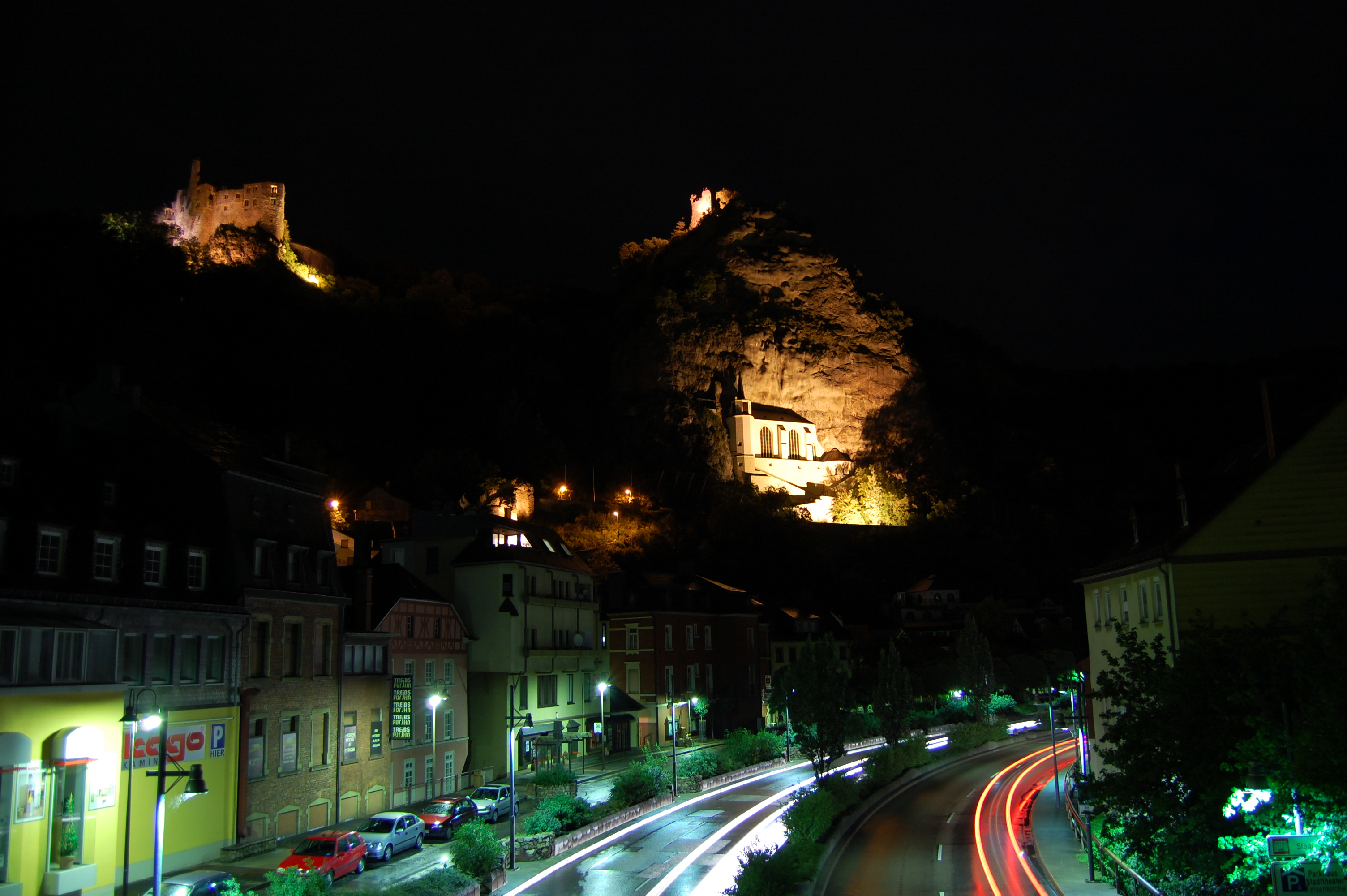 Oberstein bei Nacht